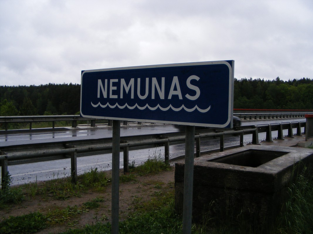 MOST DROGOWY NAD NIEMNEM.